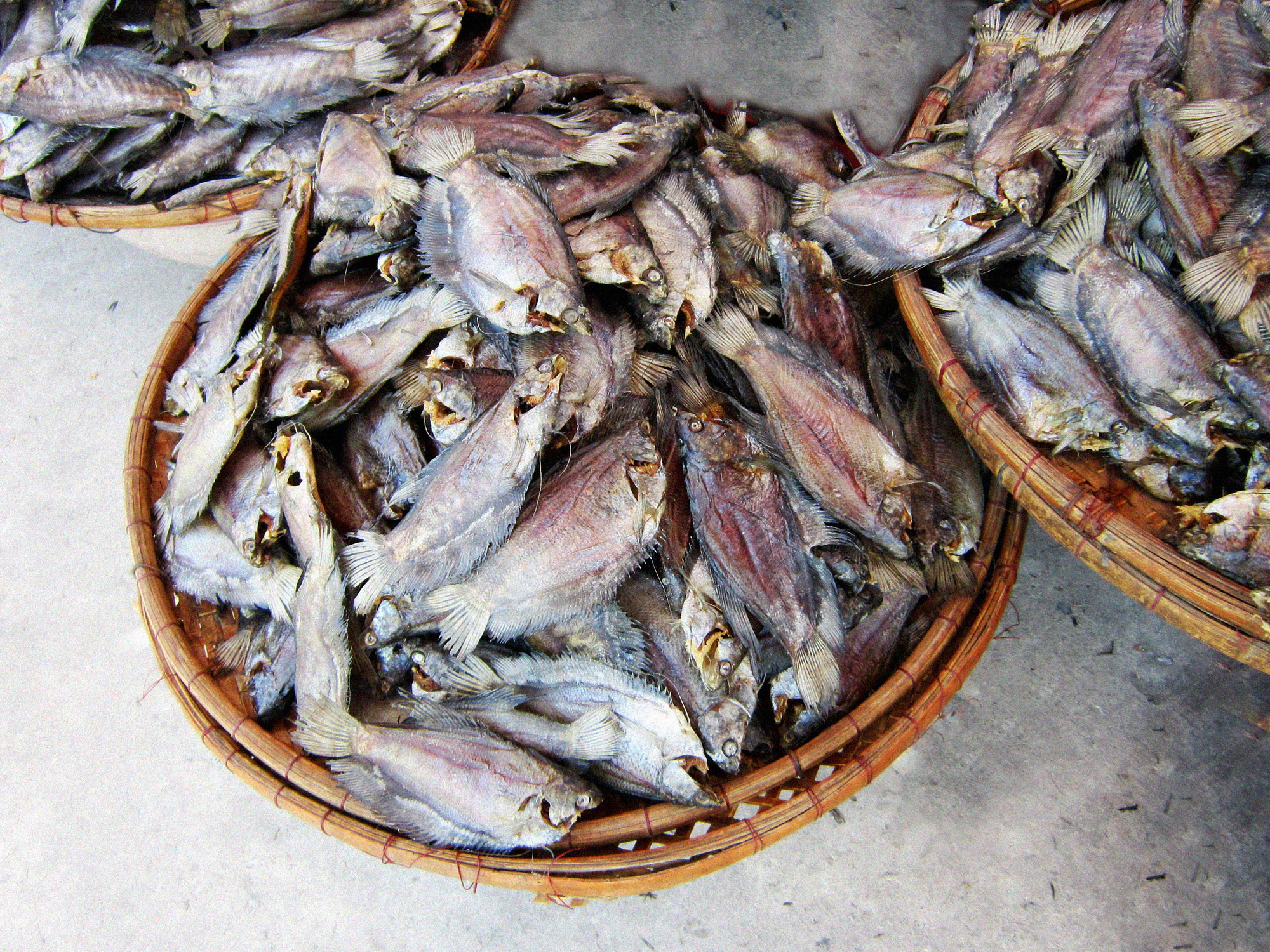 Cá sặc rằn làm khô được bày bán ở chợ Bạc Liêu, Việt Nam.